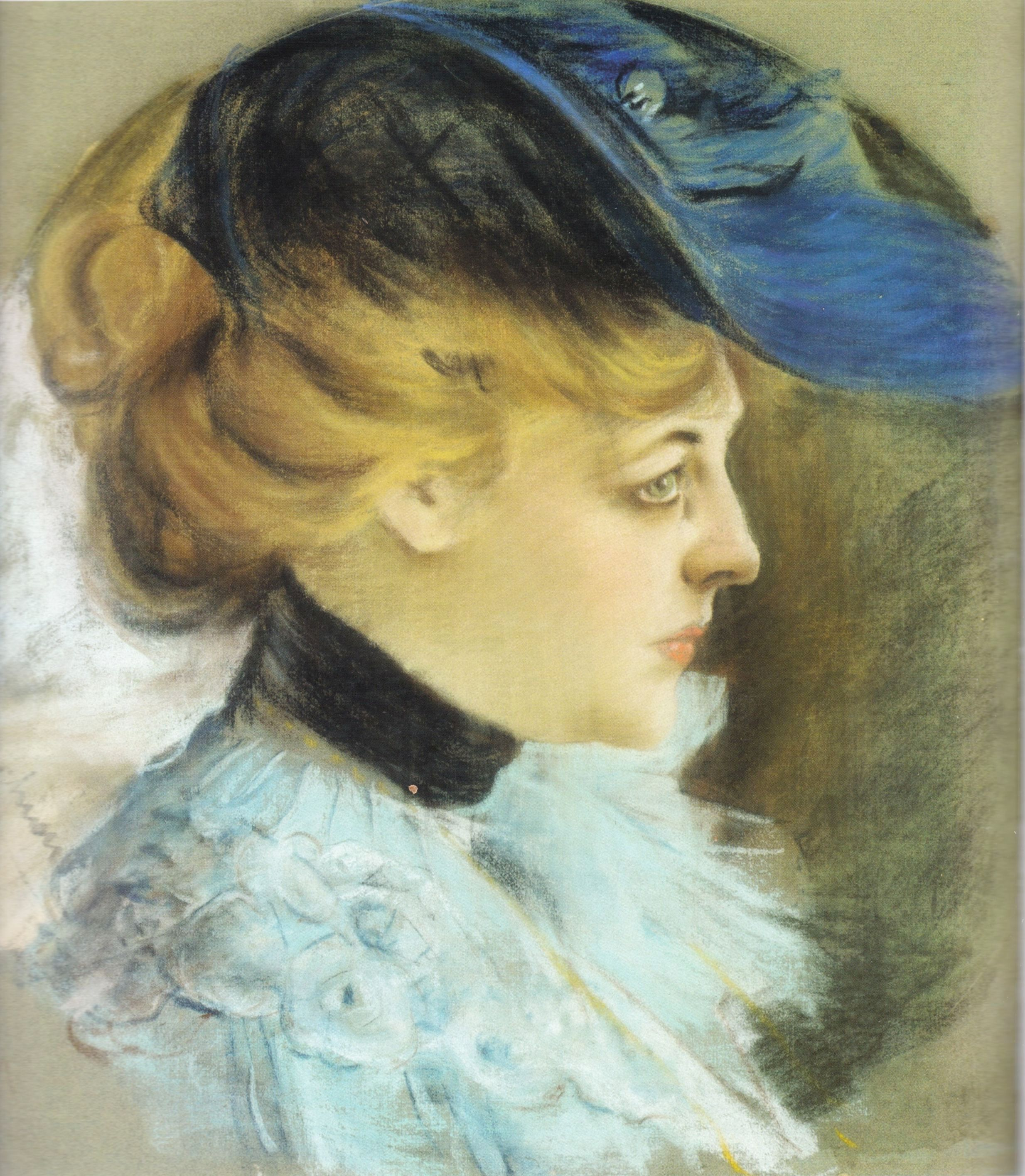 Portretul doamnei Olivier, pastel pe pânză, 0,453 x 0,455 m, semnat pe latura stângă cu gri Luchian, colecția N. Poenaru-Iatan, dr. I. Chiricuță, Achiziție 1967 - MNAR, Cabinetul de Desene și Gravuri, inv. 72057/9347